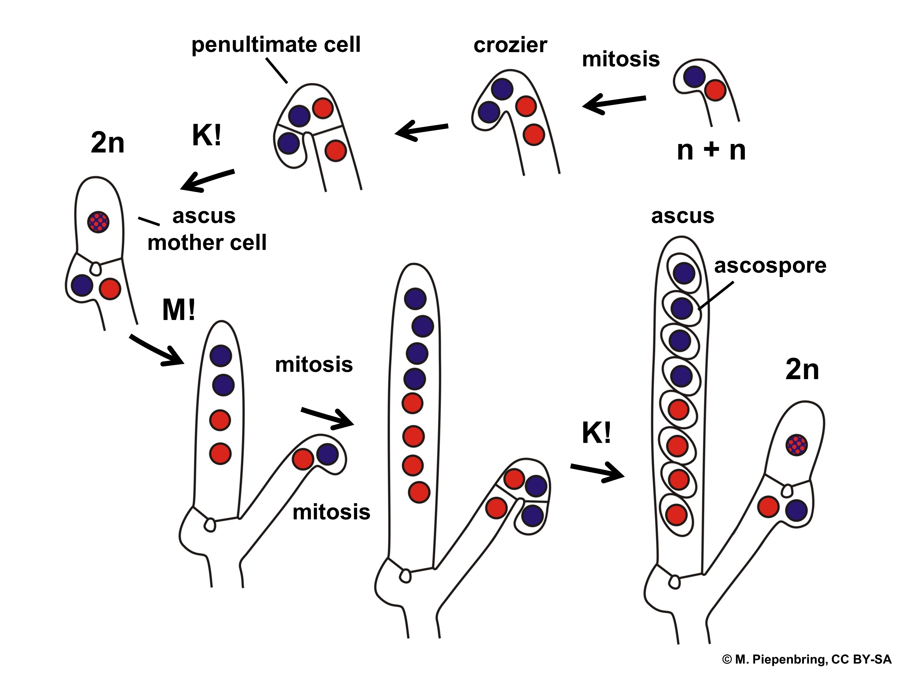 Biologische Schemata, gezeichnet und freigegeben von M. Piepenbring